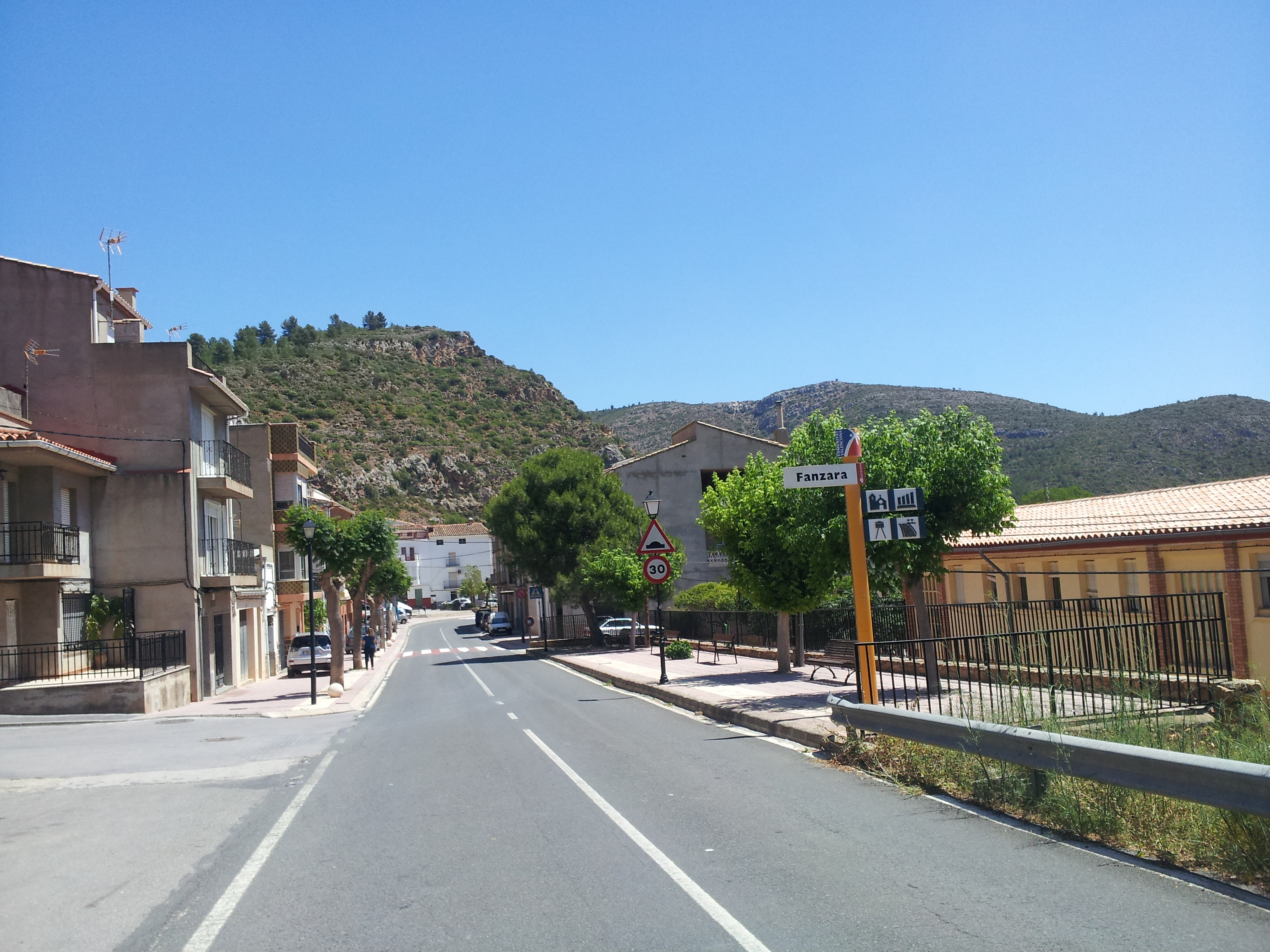 Imatges de la localitat